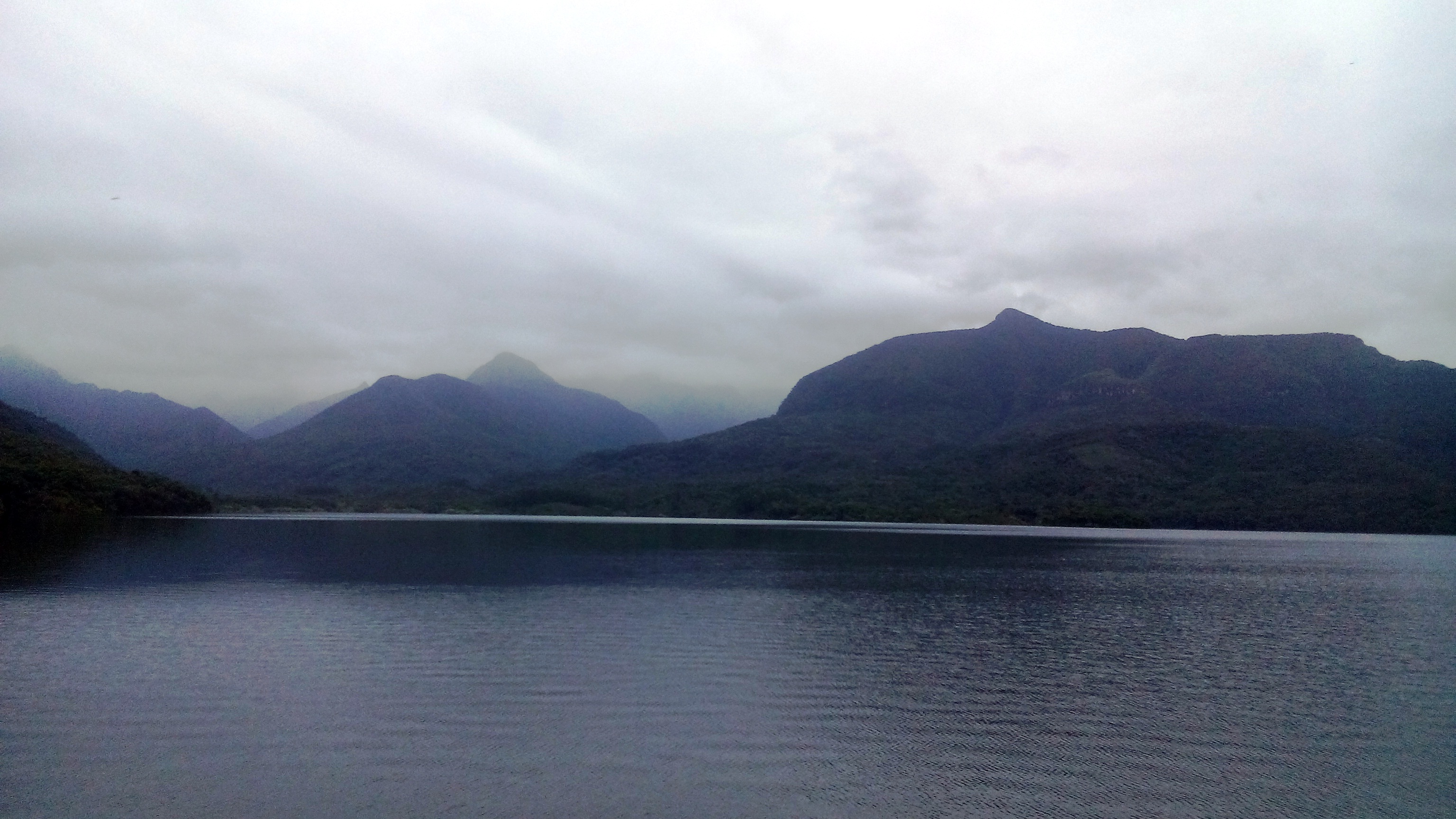 Foto panorâmica Barragem do Rio São Bento